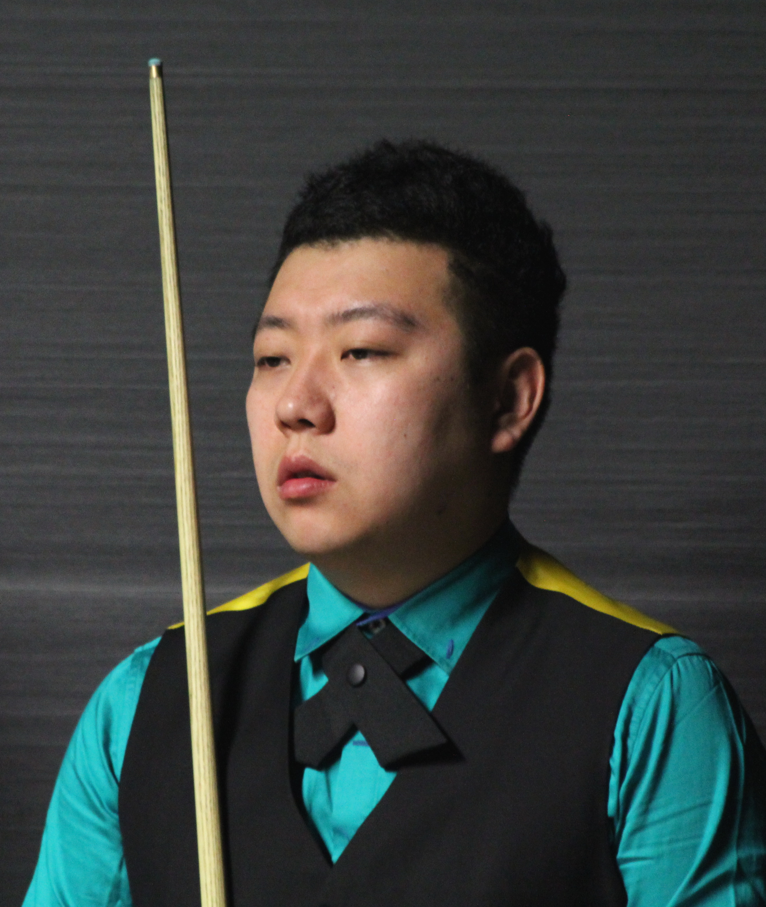 Li Hang beim Paul Hunter Classic 2016